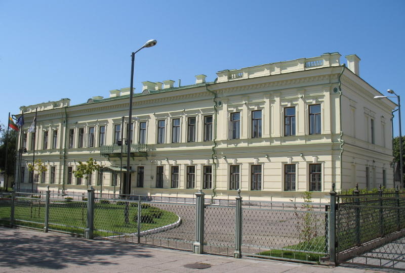 Lietuvos kariuomenės Generalinis štabas, buv. Kauno tvirtovės komendanto rūmai.